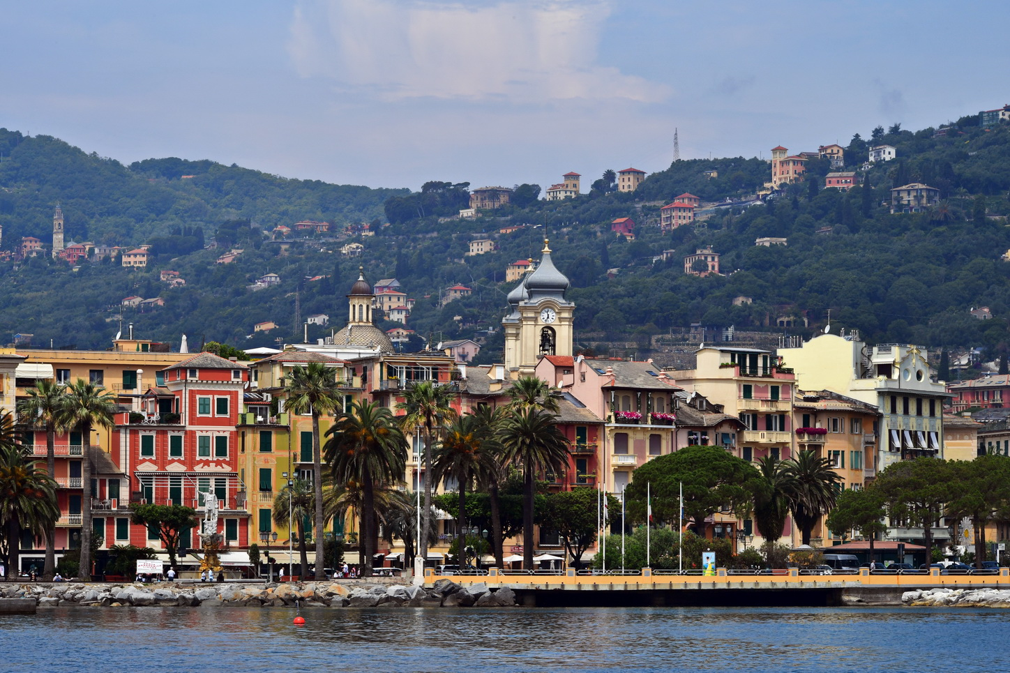 Santa Margherita Ligure Seesicht